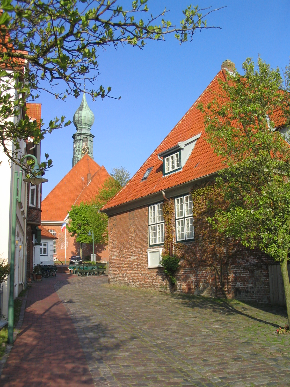 Saint Bartholomäus Church Wesselburen on a Wurt